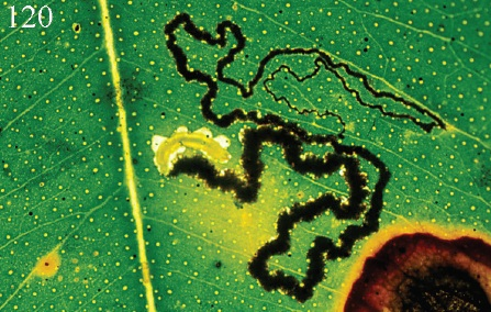 Pectinivalva acmenae [Original caption: 120 P. (M.) acmenae on Syzygium smithii]